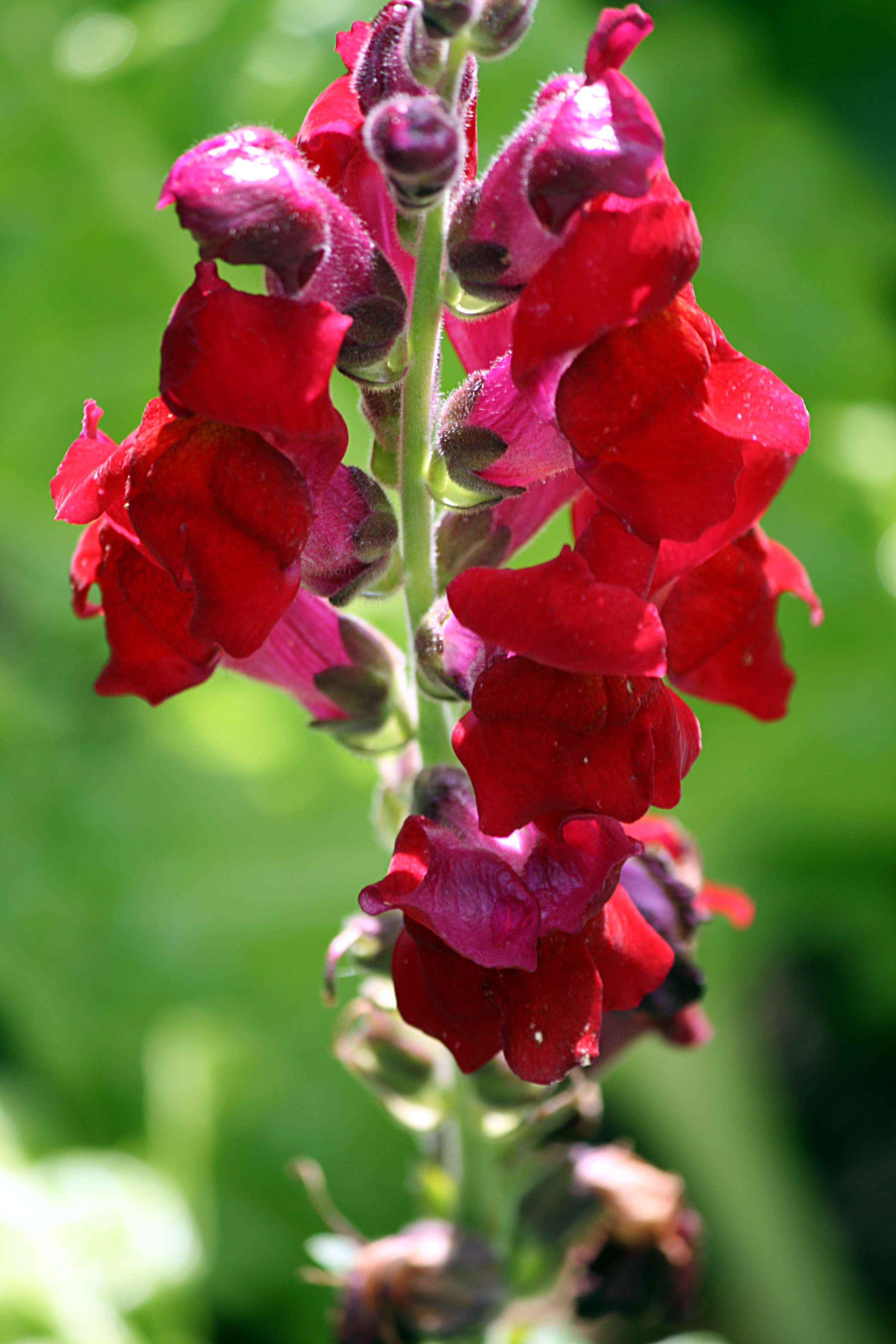 Löwenmaul